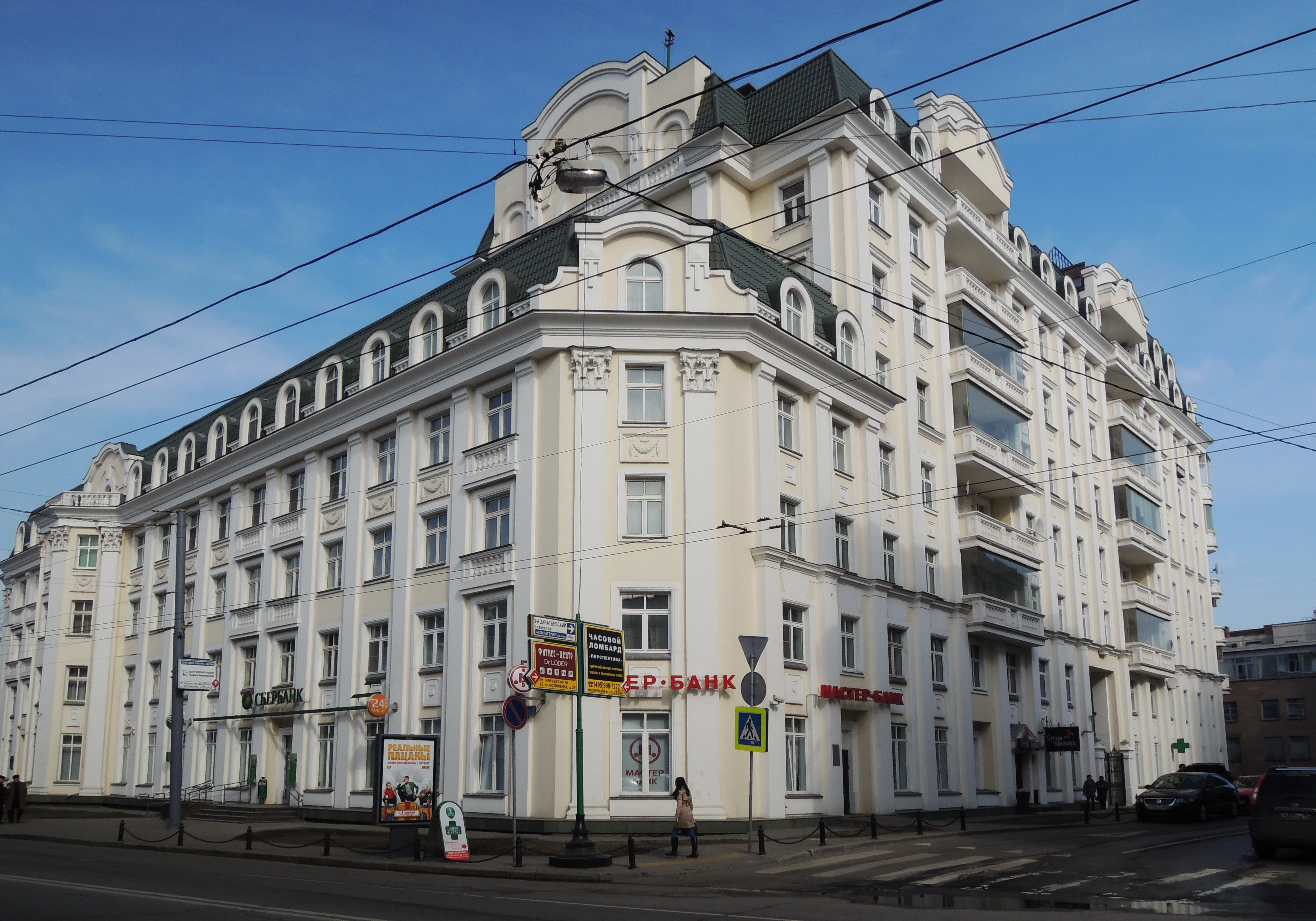 Остоженка 25, угол Коробейникова переулка (направо). Жилой комплекс «Опера-Хаус» (2003)